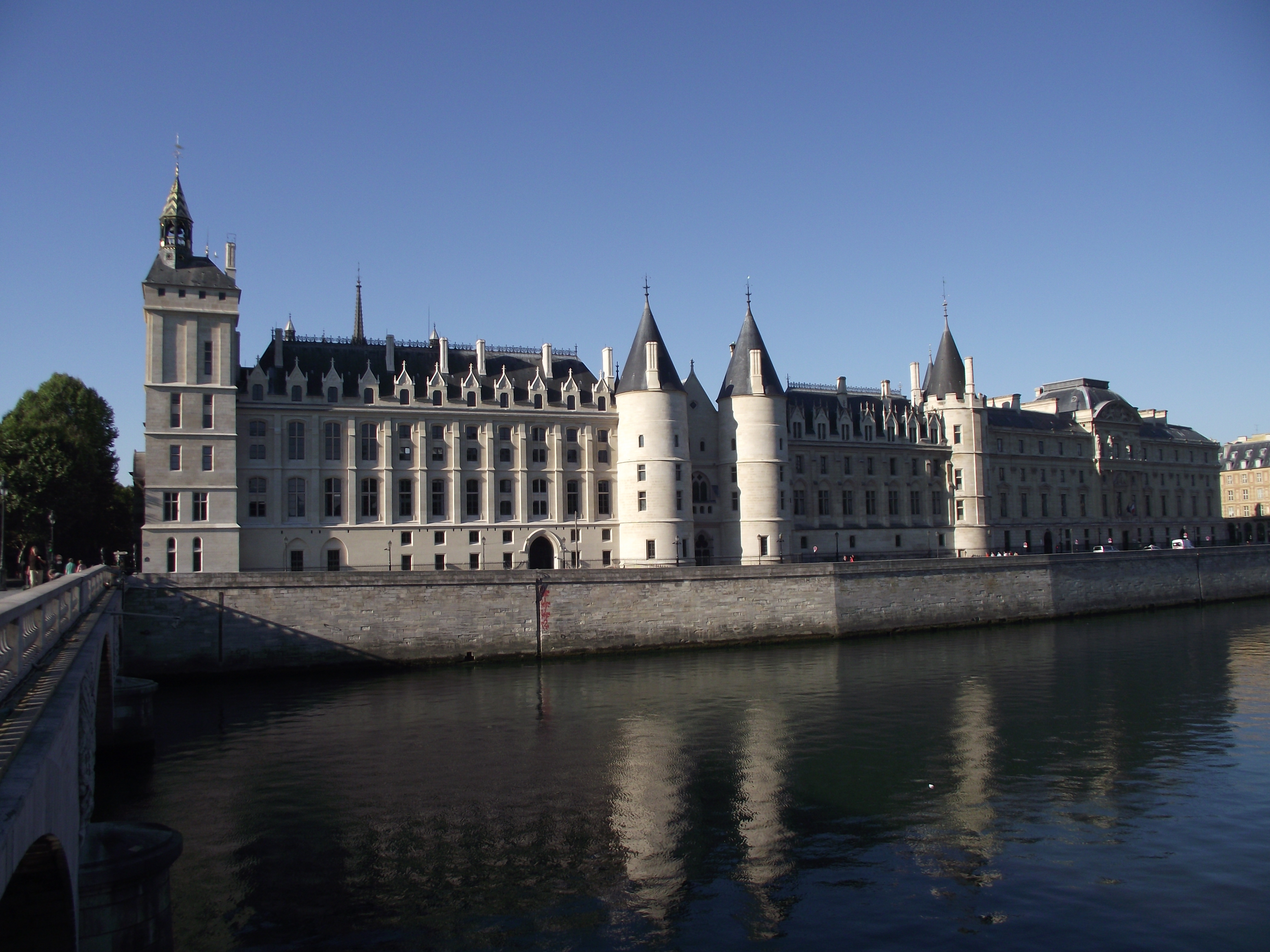 Parigi, Conciergerie, XIV secolo